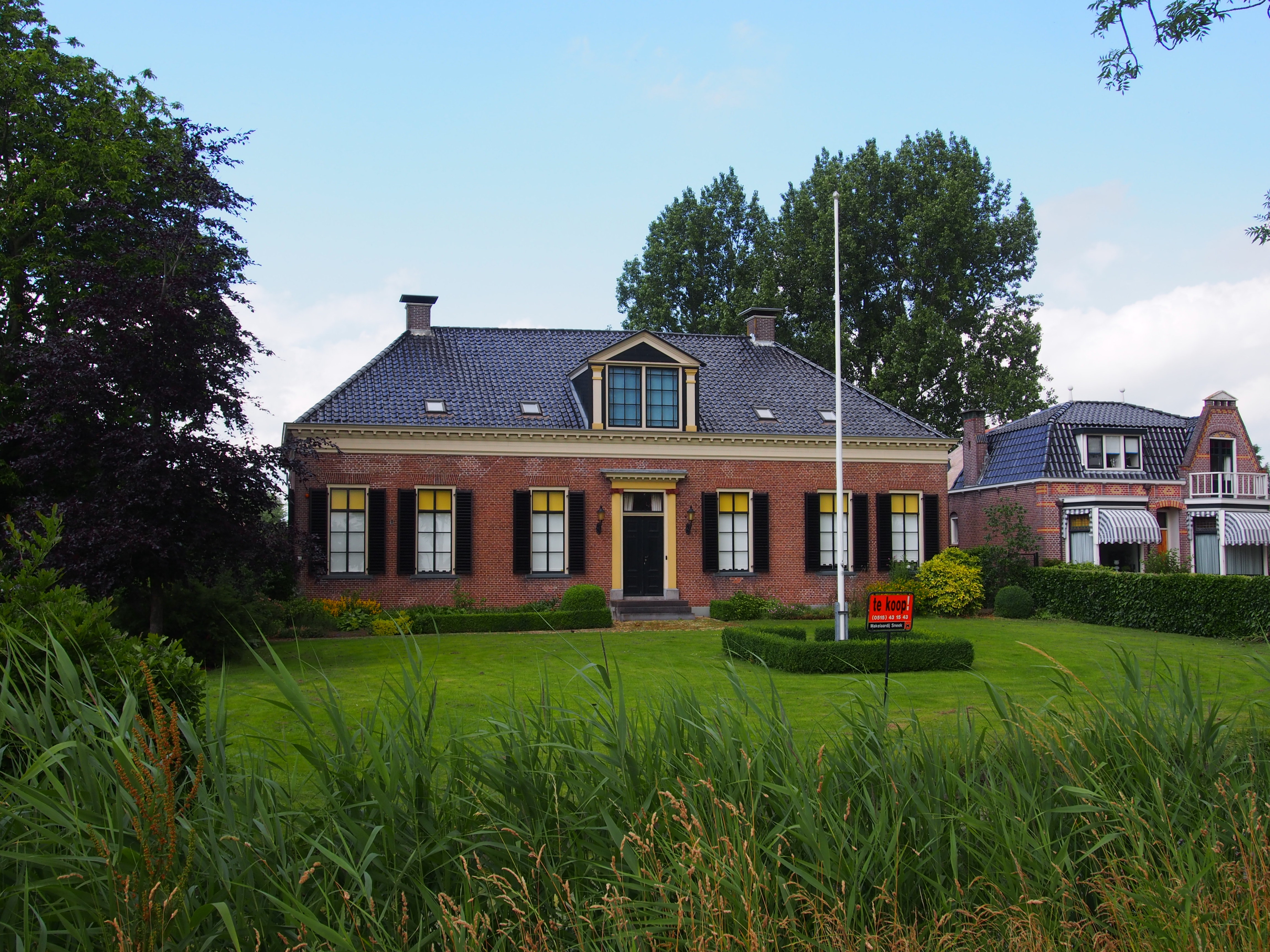 Breed landhuis met omlijste ingang, achtruitvensters en rechte kroonlijst onder laag schilddak met hoekschoorstenen met borden